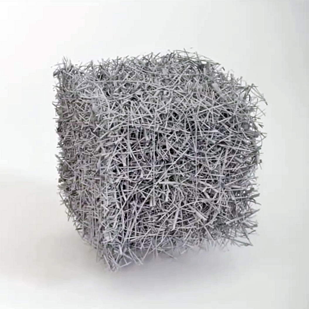 Los filtros HEPA pueden filtrar partículas microscópicas de pocas micras de tamaño. Esto lo consiguen gracias a las fibras posicionadas aleatoriamente en forma de malla